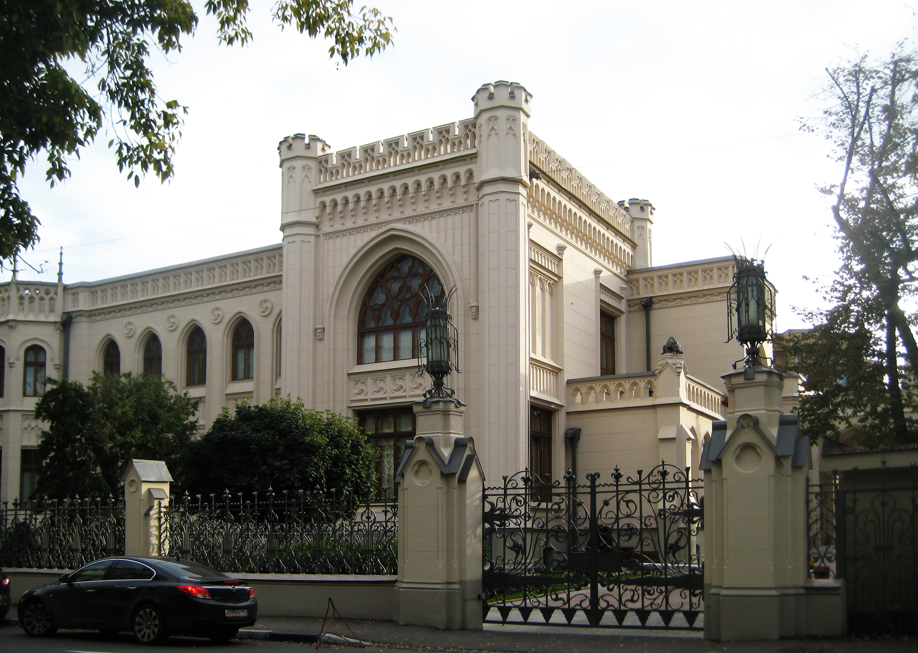 Особняк Зинаиды Морозовой